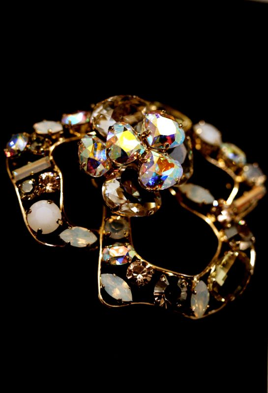 Strass schmuck